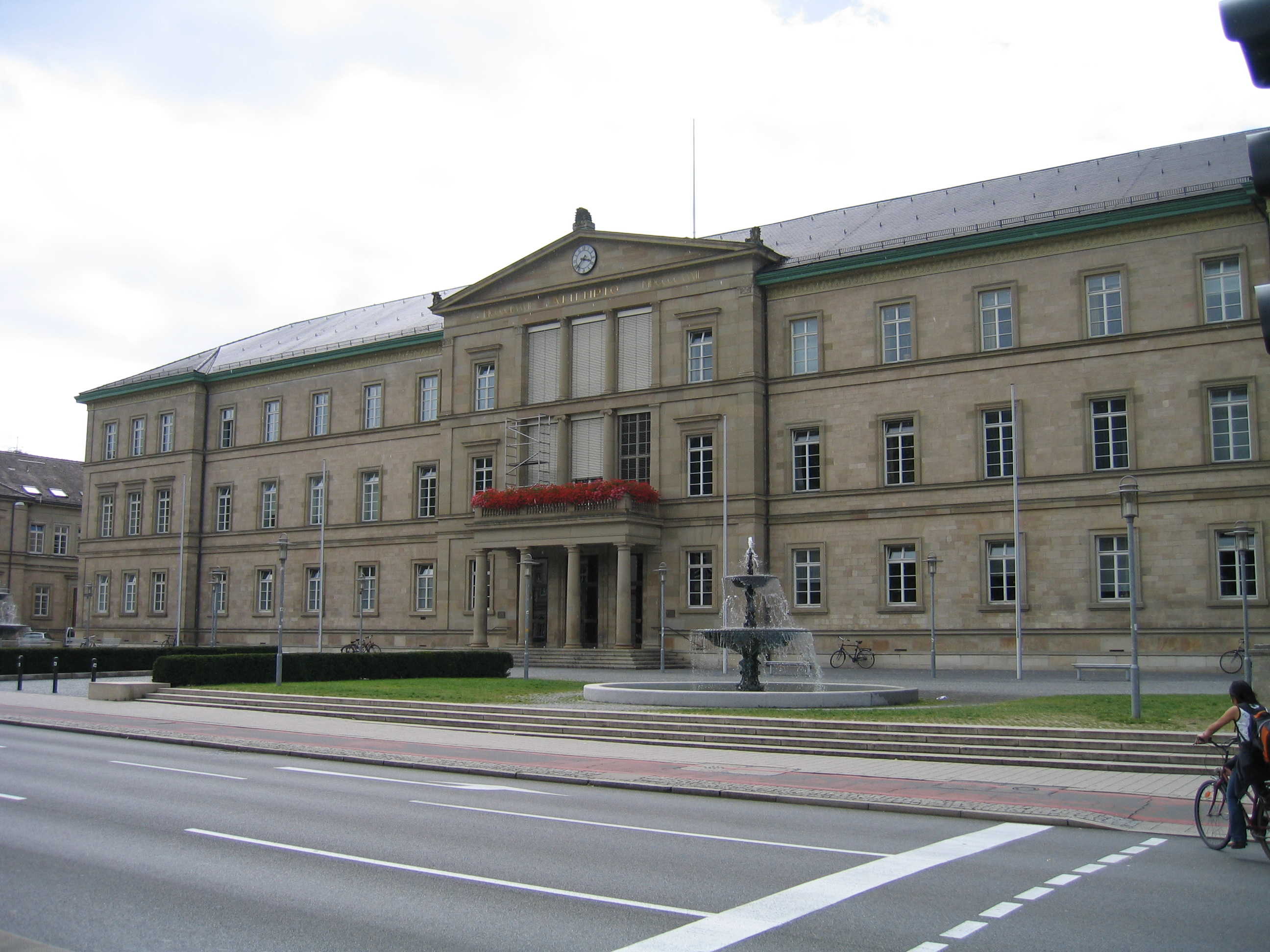 Tuebingen Uni Neue Aula